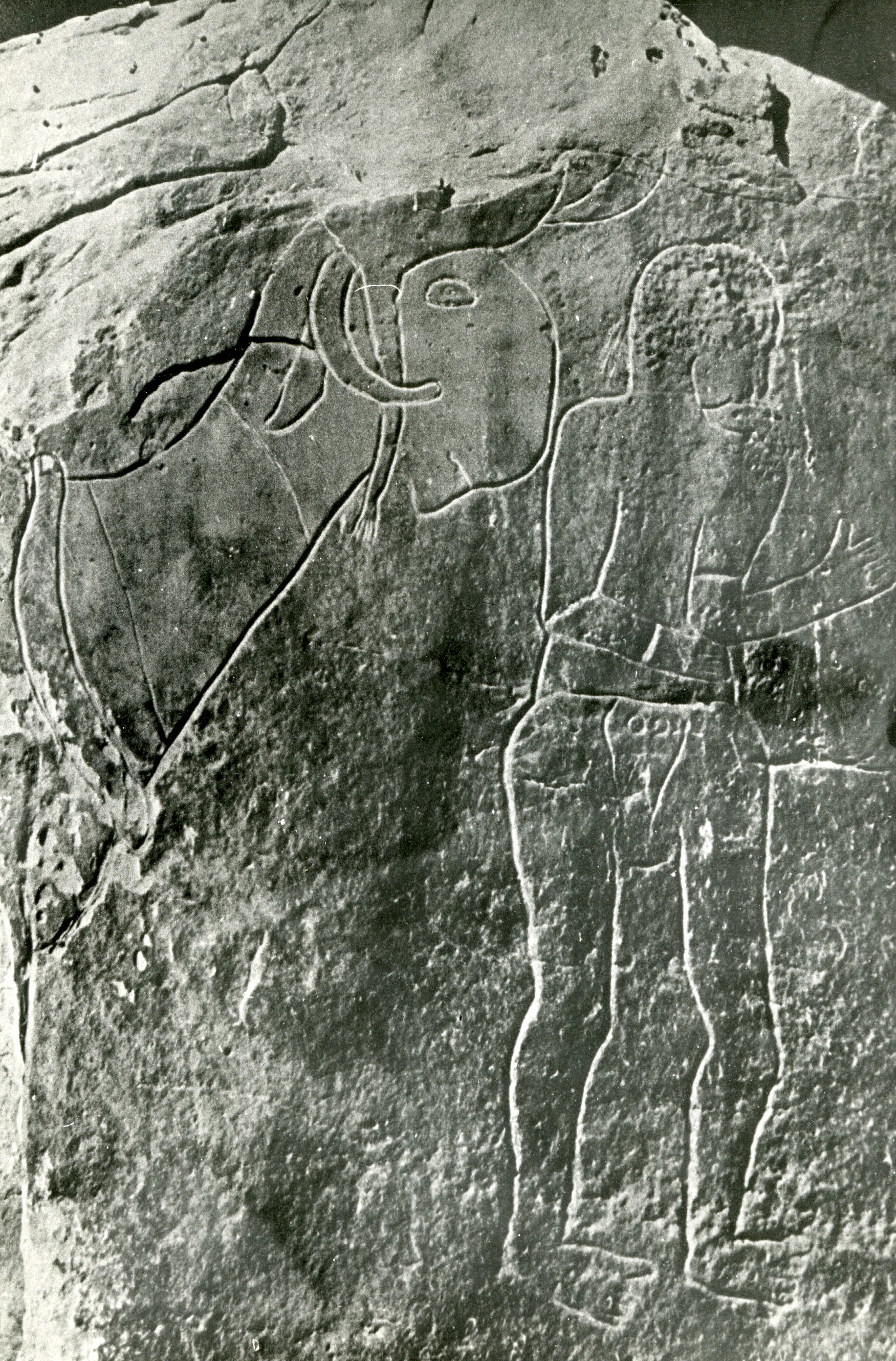 gravure préhistorique de la région de Djelfa (Algérie)